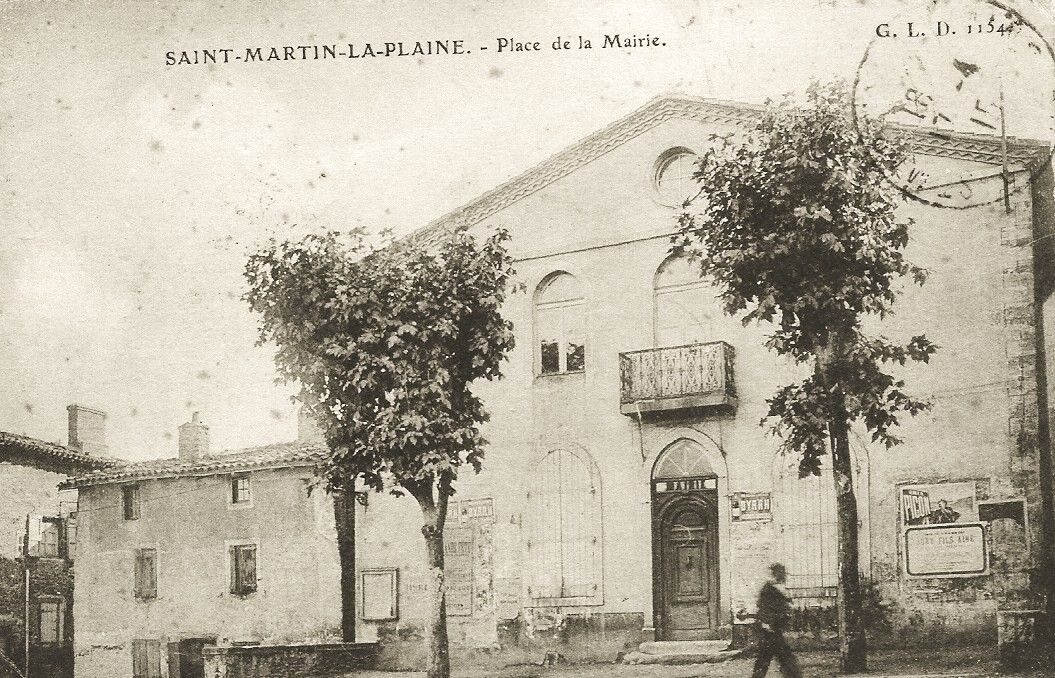 Saint-martin-la-Plaine au début du XX° siècle (carte postale envoyée en 1915)